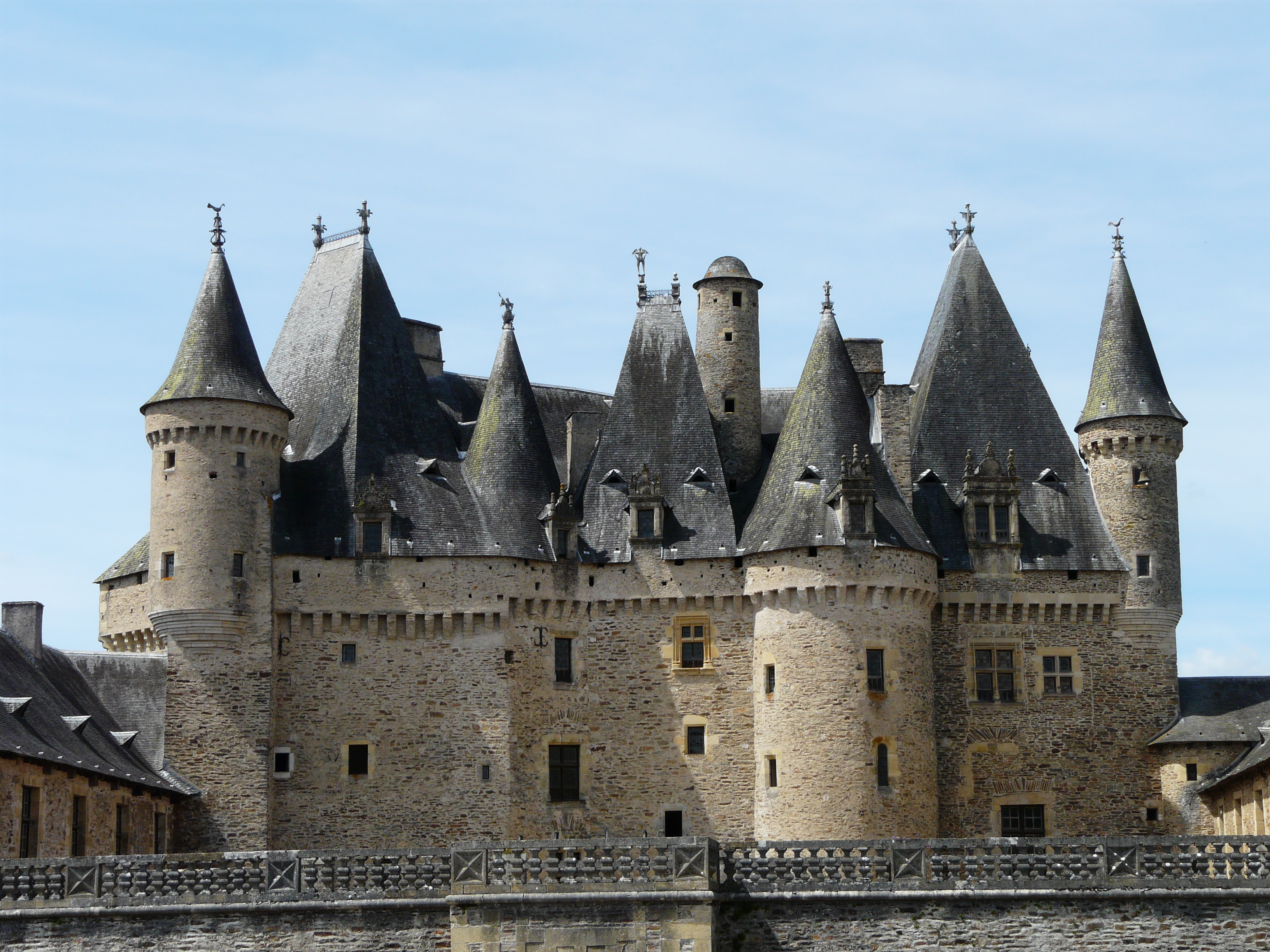 Côté nord-est, le corps principal du château de Jumilhac, Jumilhac-le-Grand, Dordogne, France.